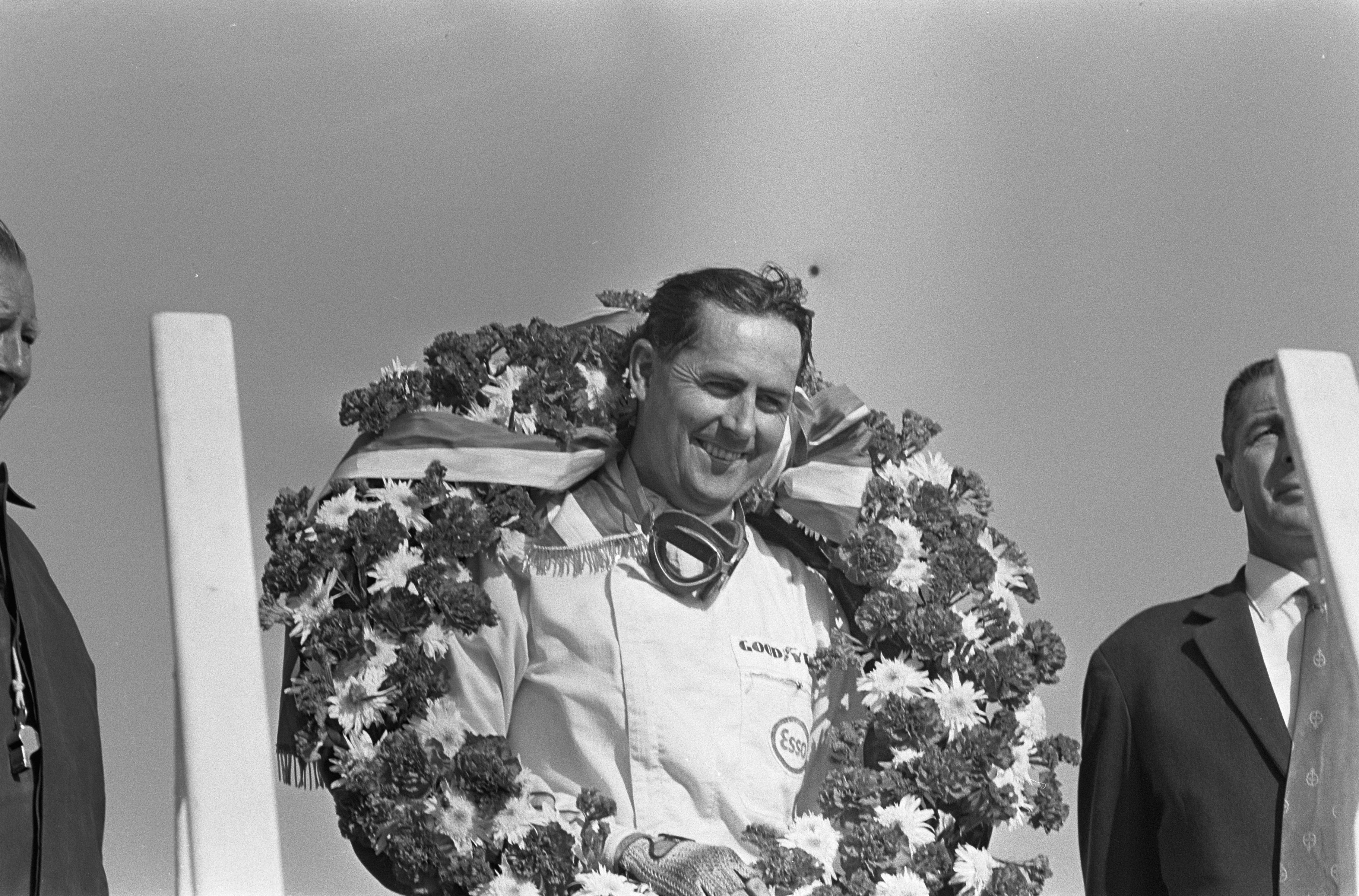 Grand Prix te Zandvoort, winnaar Jack Brabham op podium met krans.